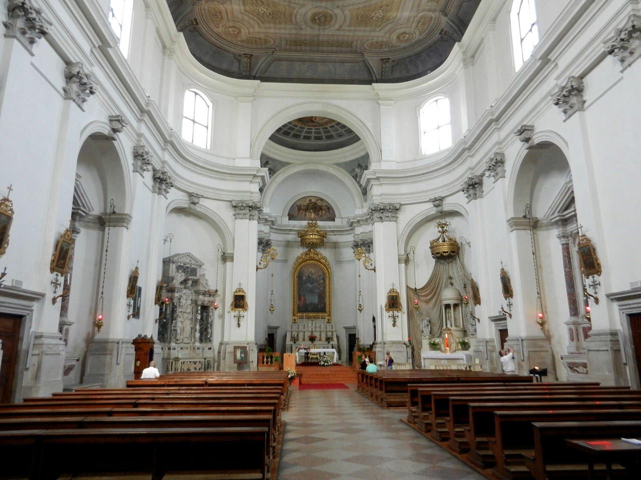 Vittorio Veneto - Interno del Duomo di Serravalle (Chiesa di S. Maria Nova)